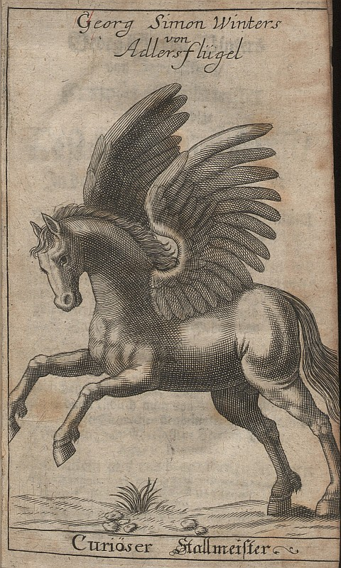 Original image description from the Deutsche Fotothek Landwirtschaft & Nutztierhaltung & Biologie & Pferd